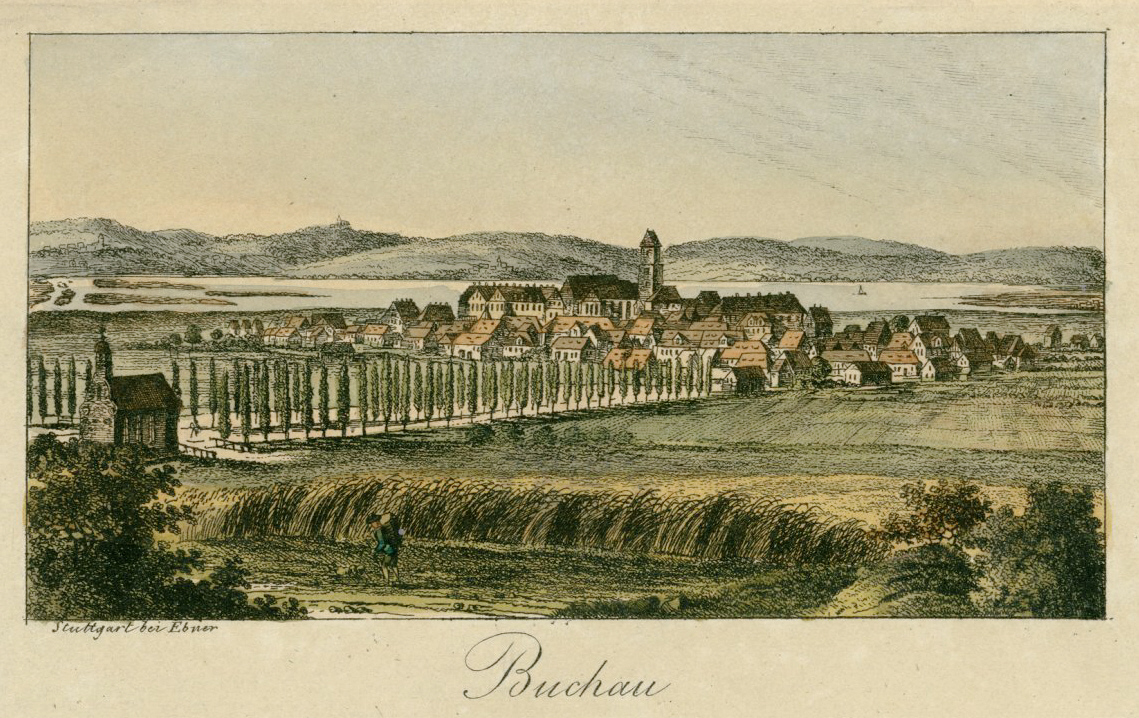 Buchau. Verlag Ebner, Stuttgart, um 1820